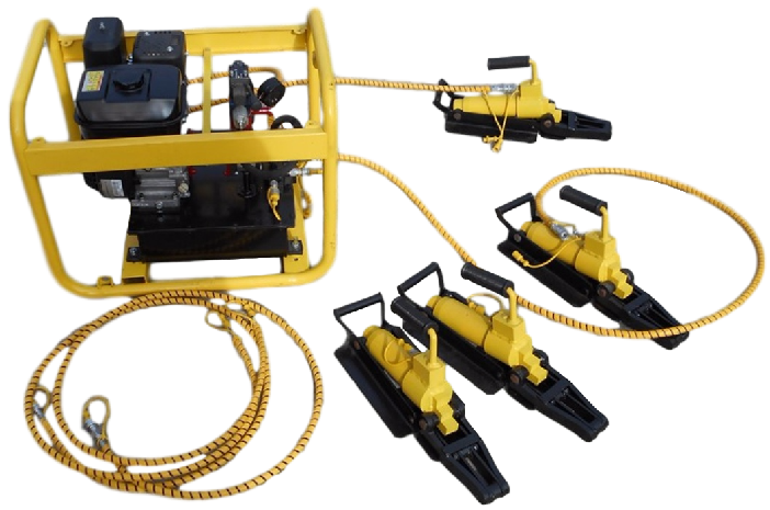 Гидравлический рихтовщик РГУ4Р